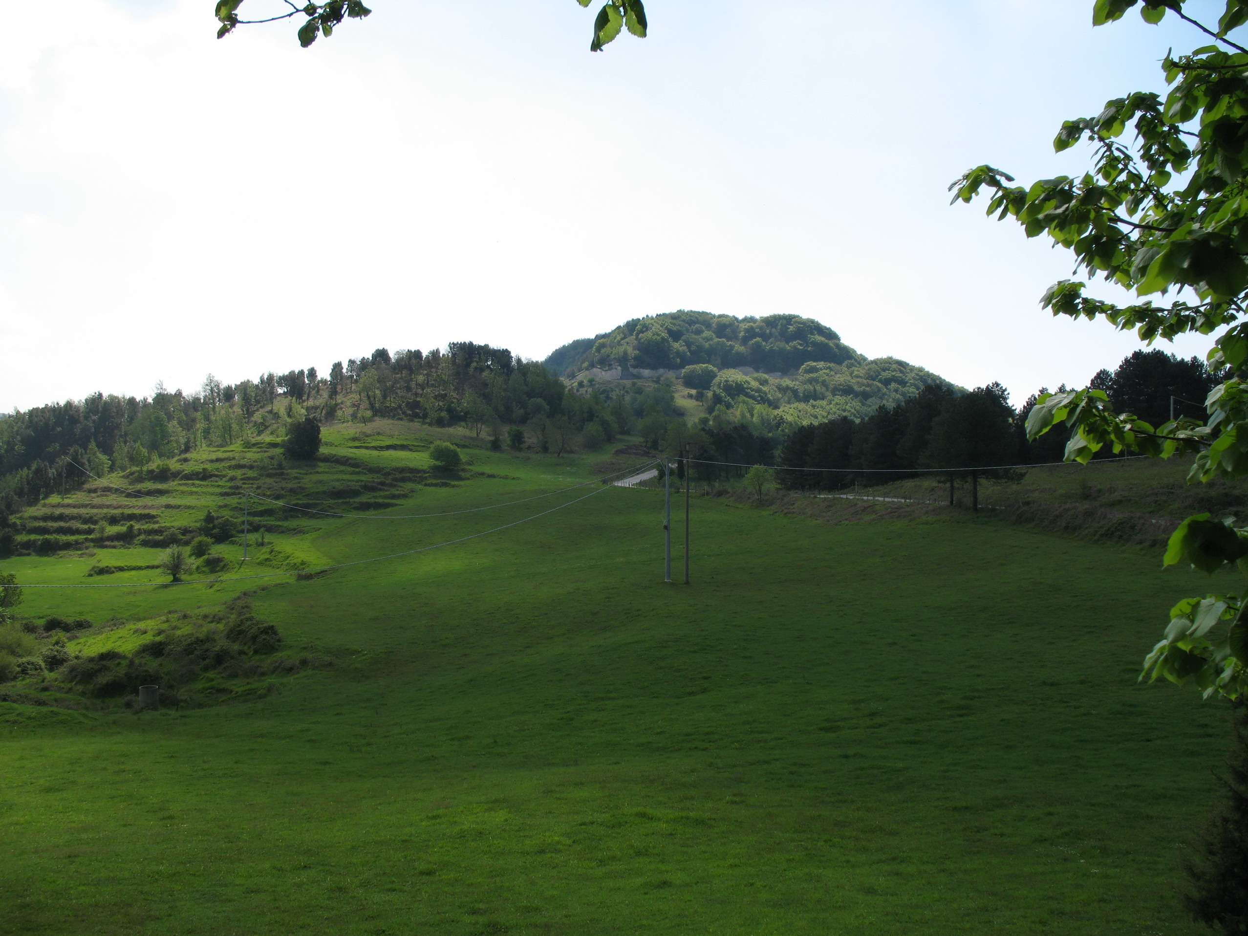 Paesaggio al passo della Limina in provincia di Reggio Calabria